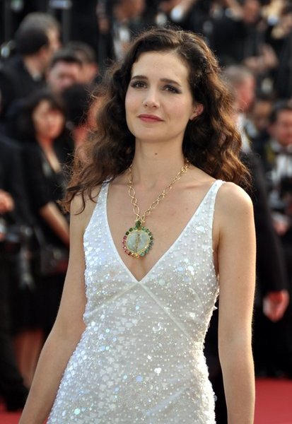 Chloé Lambert au festival de Cannes